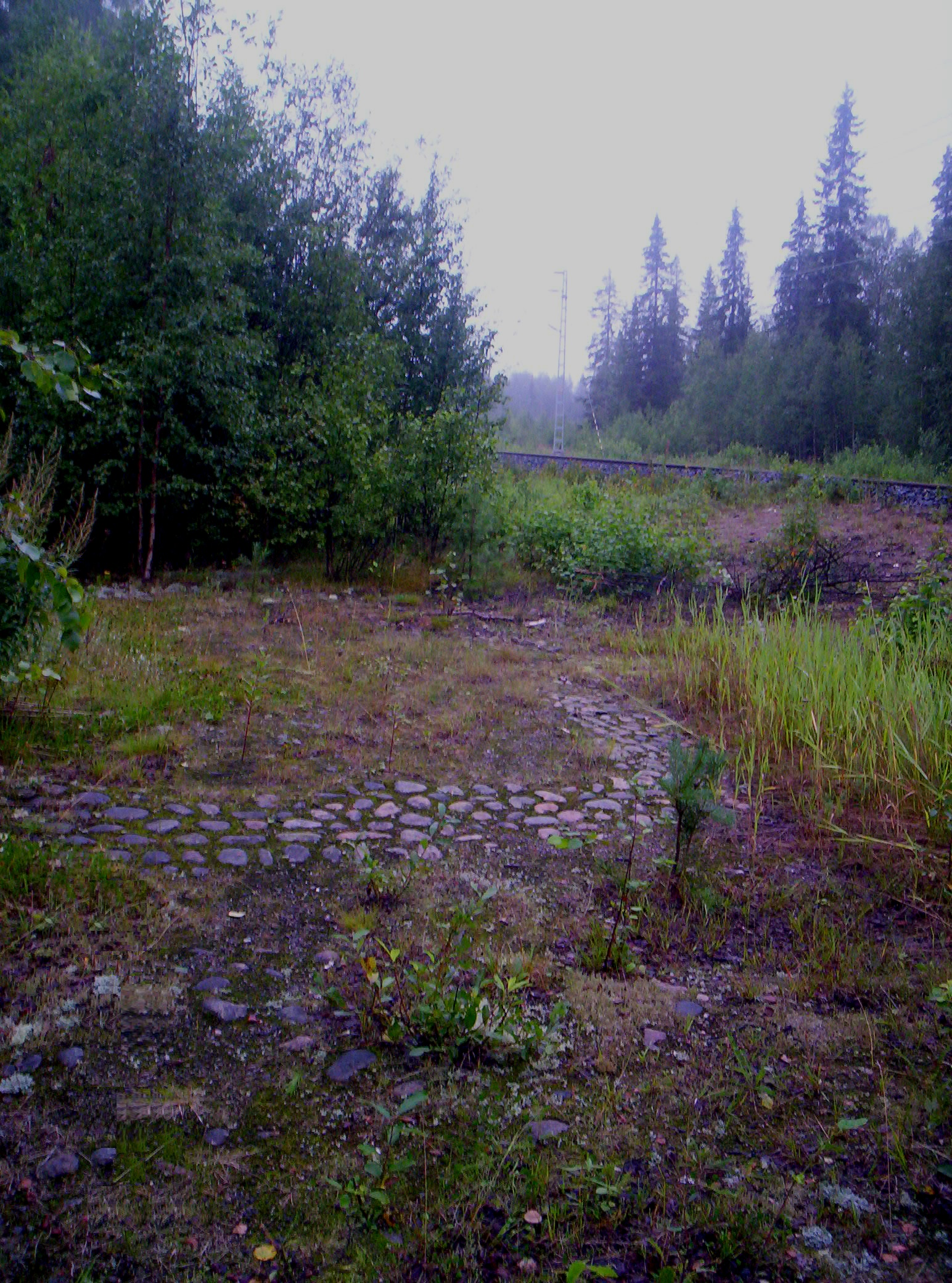 Maksniemen seisakkeen sijaintipaikka